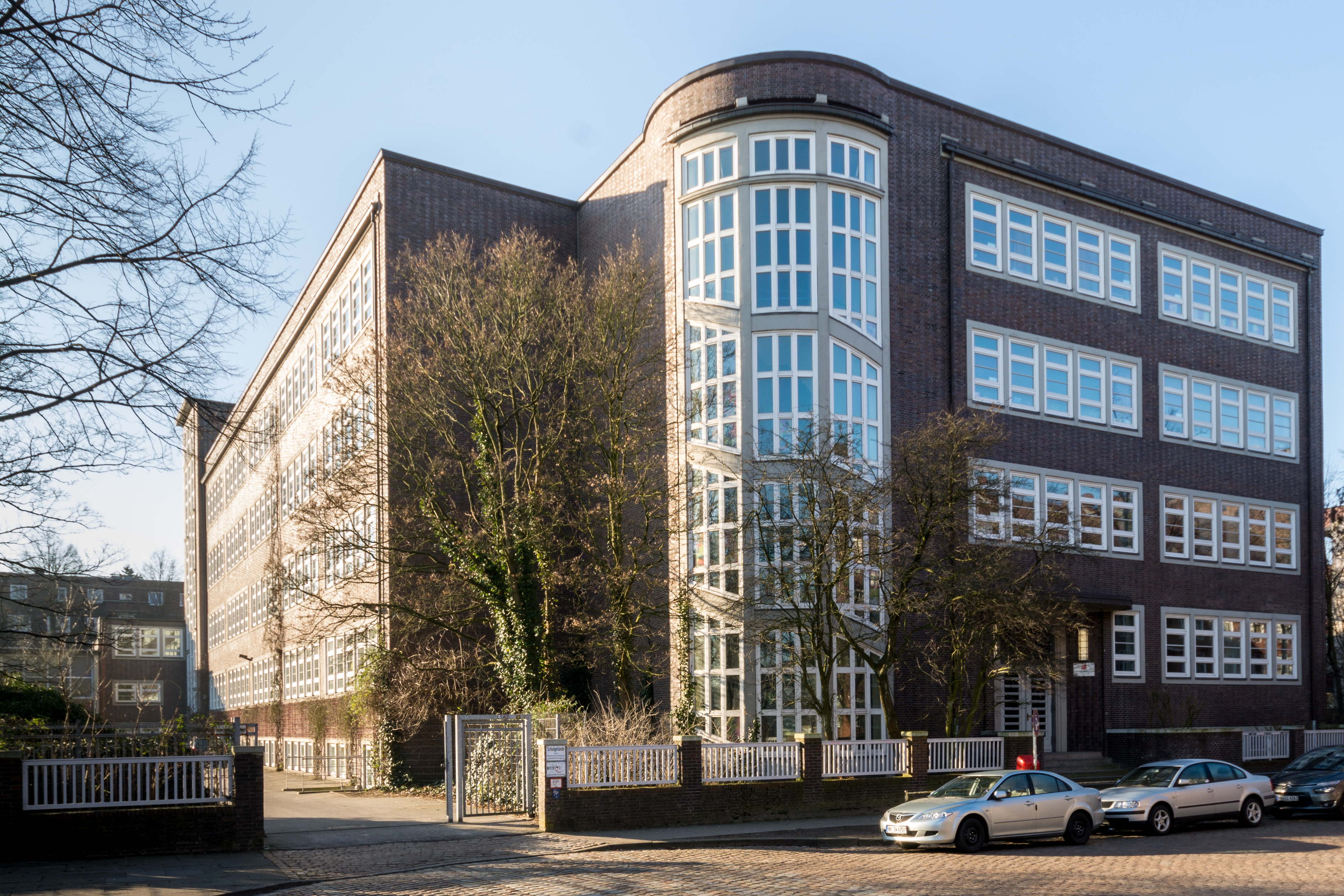 Schule Griesstraße in Hamburg-Hamm, Blick von der Marienthaler Straße. This is a photograph of an architectural monument.